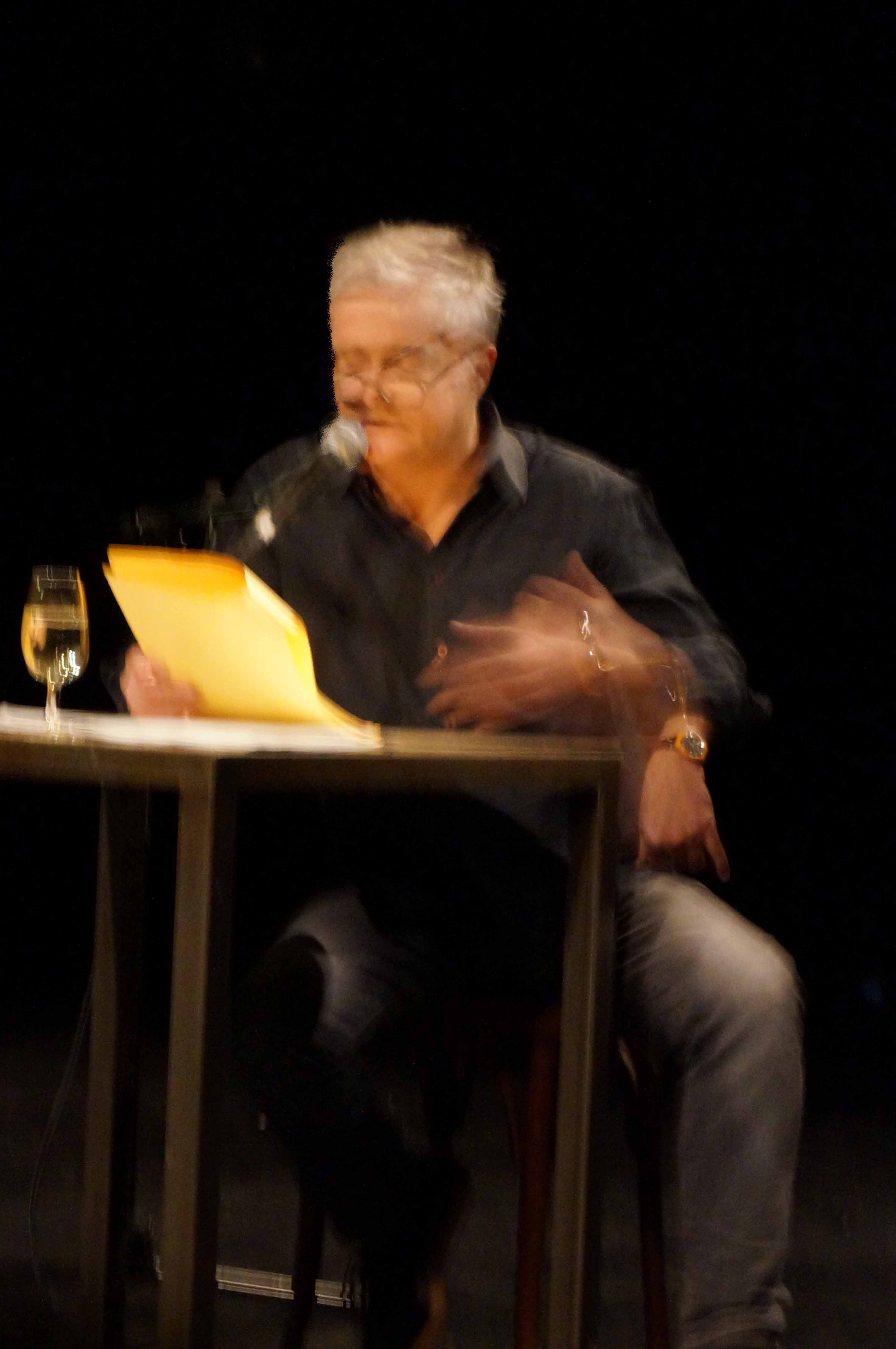 Performance lors du festival.